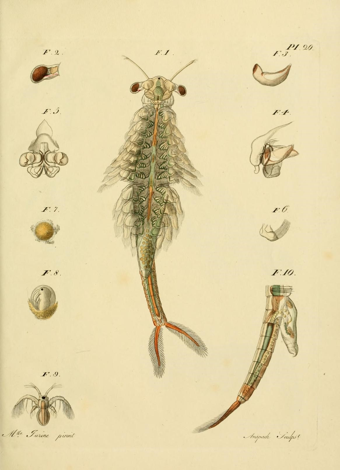 I^.'X jrJ y. j^.^. JT.S. t^^C .' tj^^/um nuwd J'./ /y /V 10. ■^ru/xwi • yf/ymi f